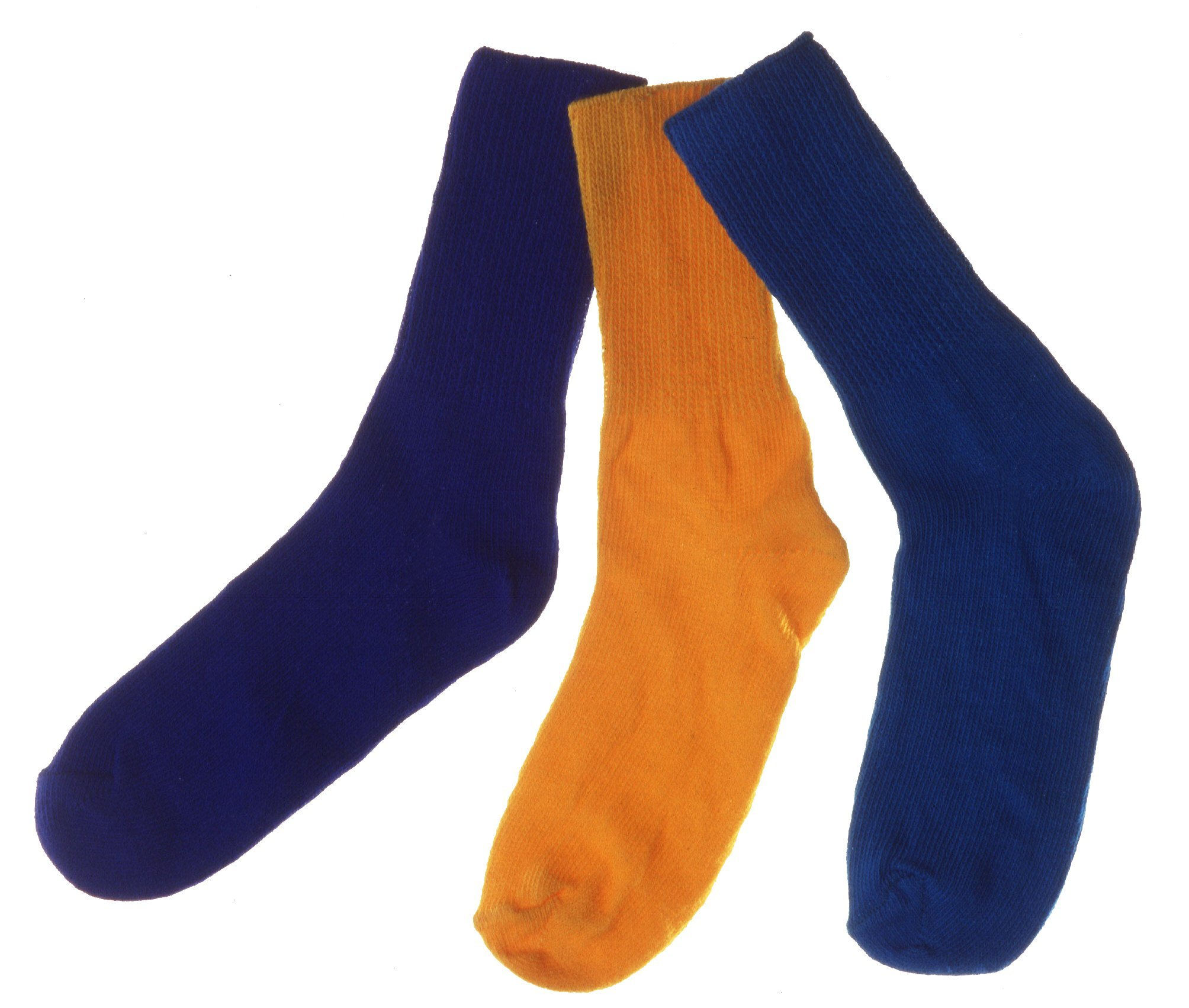 flame retardant cotton socks